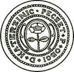 pečeť obce Kateřinice